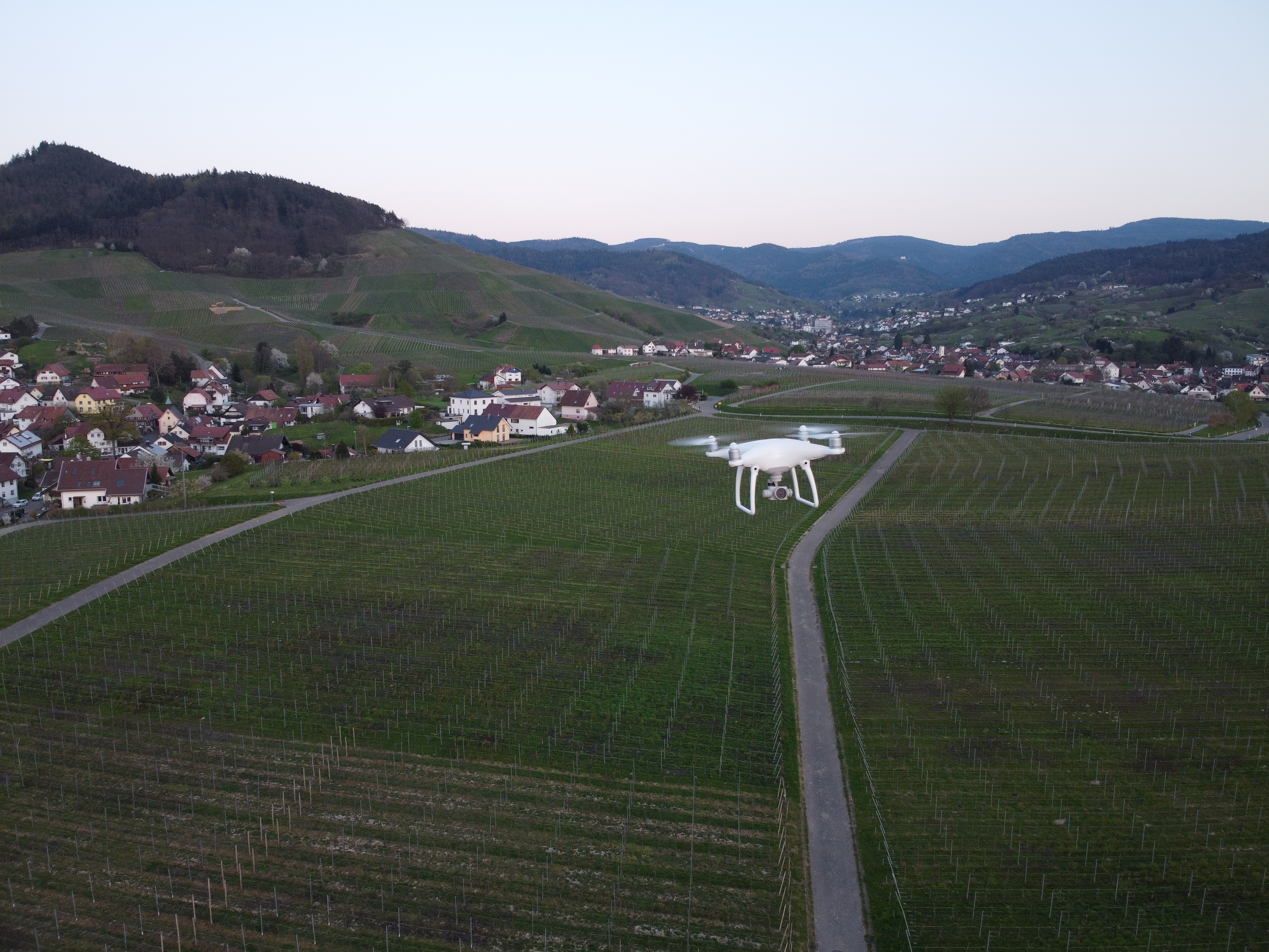 Eine DJI Phantom 4 in der Luft, aufgenommen mit einer DJI Mavic Mini.